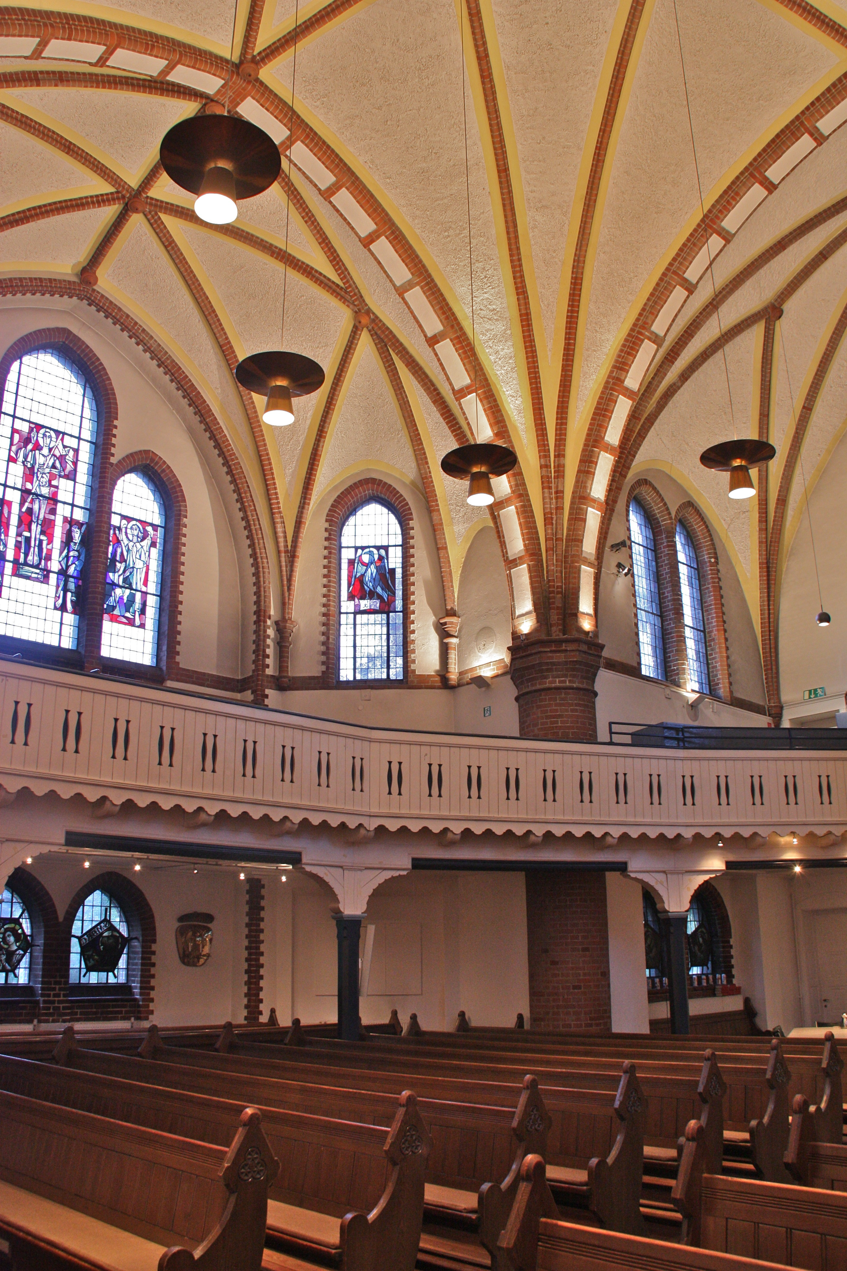 Hamburg, Wandsbek, Kreuzkirche, Innenraum, Empore